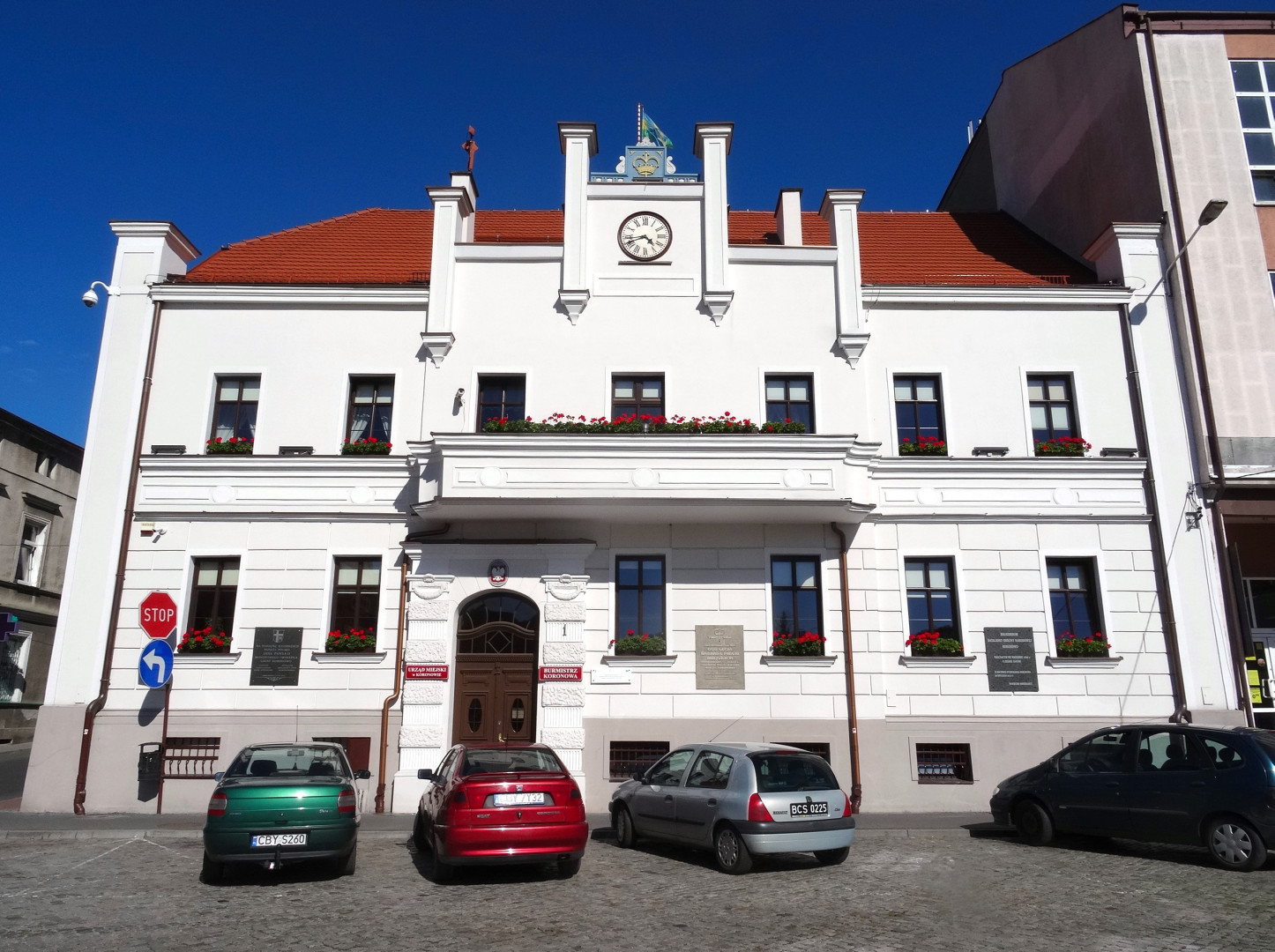 Ratusz na rynku w Koronowie